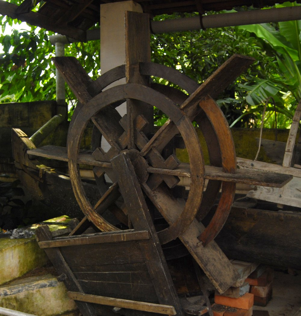 നിരണം പള്ളിയിൽ സൂക്ഷിച്ചിരിക്കുന്ന ചക്രം